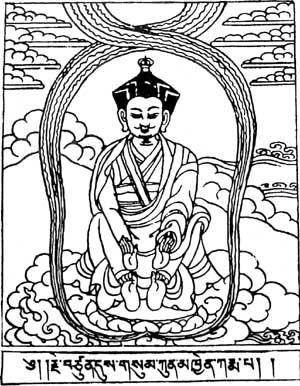 Der 1. Karmapa Düsum Chenpa